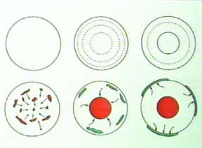 Egy kondritos kisbolygó fejlődési fokozatai